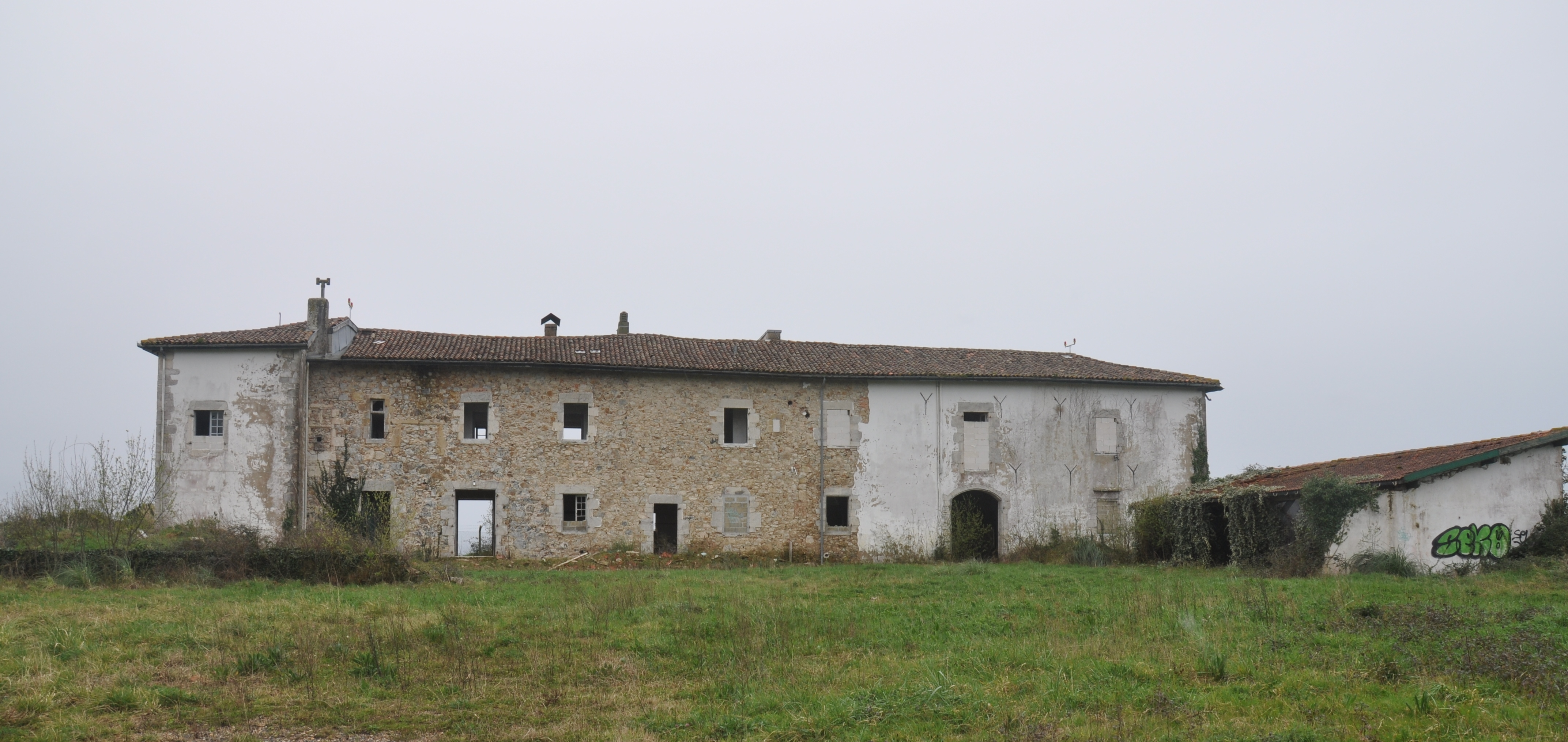 Ferme Mauléon - Anglet